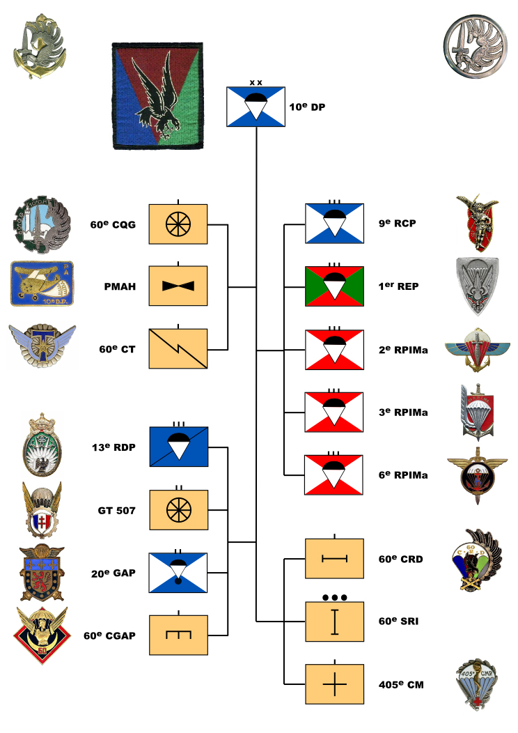 Organigramme, symbole Otan et insignes, de la 10e division parachutiste française le 1er avril 1960 (Cf. histoire des parachutistes français, éditions SPL, page 542.